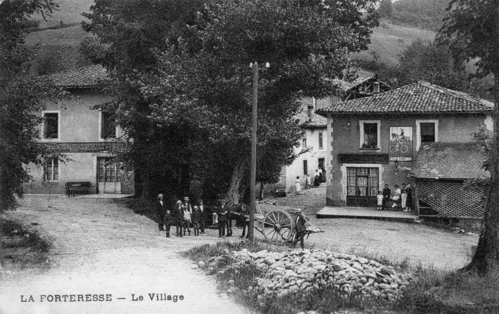 La Forteresse, Isère, France. Carte postale ancienne.